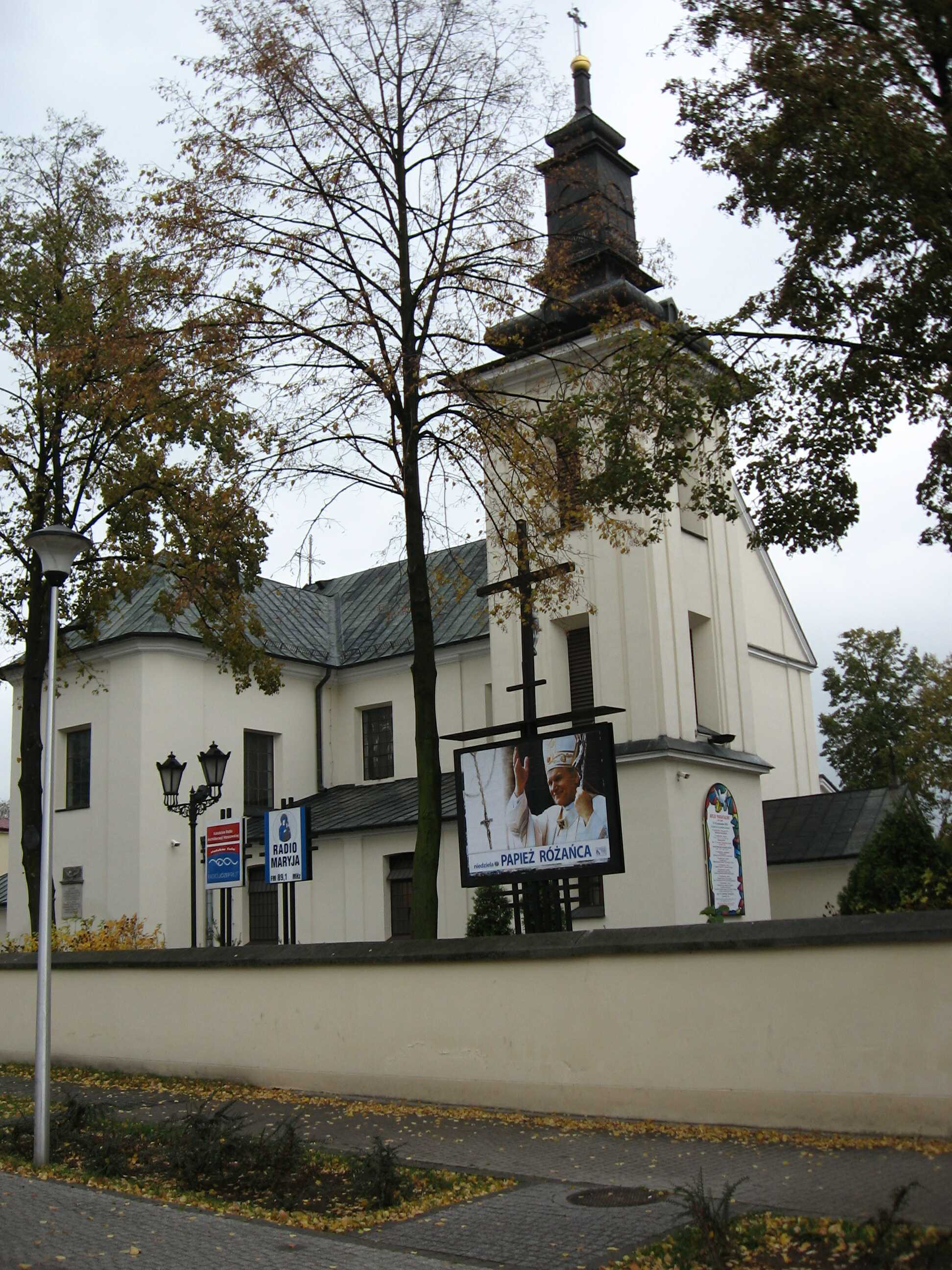 Saint Anna Church in Grodzisk Mazowiecki